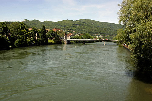 Die Aare bei Olten